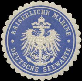 Sealing stamp Title: Deutsche Seewarte Description: Meteorologie, blau, weiß, geprägt Place: Hamburg size: 4 cm